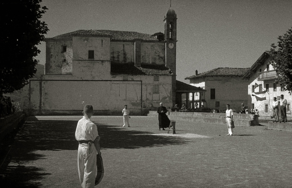 Título original: Partido de rebote en el frontón de Zubieta (5/18) Localización: San Sebastián (Guipúzcoa)